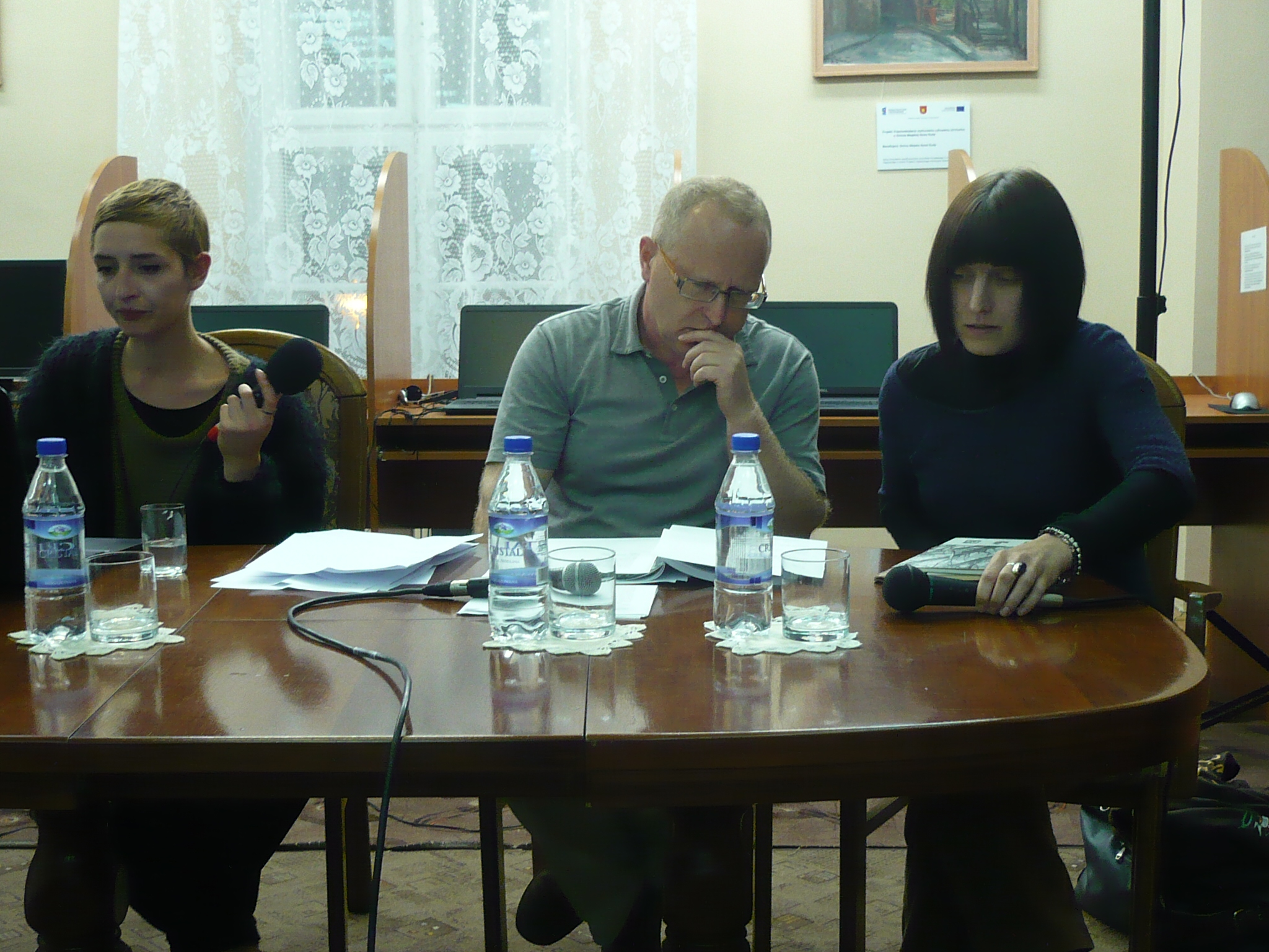 Ilona Witkowska, Karol Maliszewski, Klara Nowakowska, na Festiwalu Literacko-Artystycznym PRETEXTY. 3.10.2015 r. w Miejskiej Bibliotece Publicznej w Nowej Rudzie